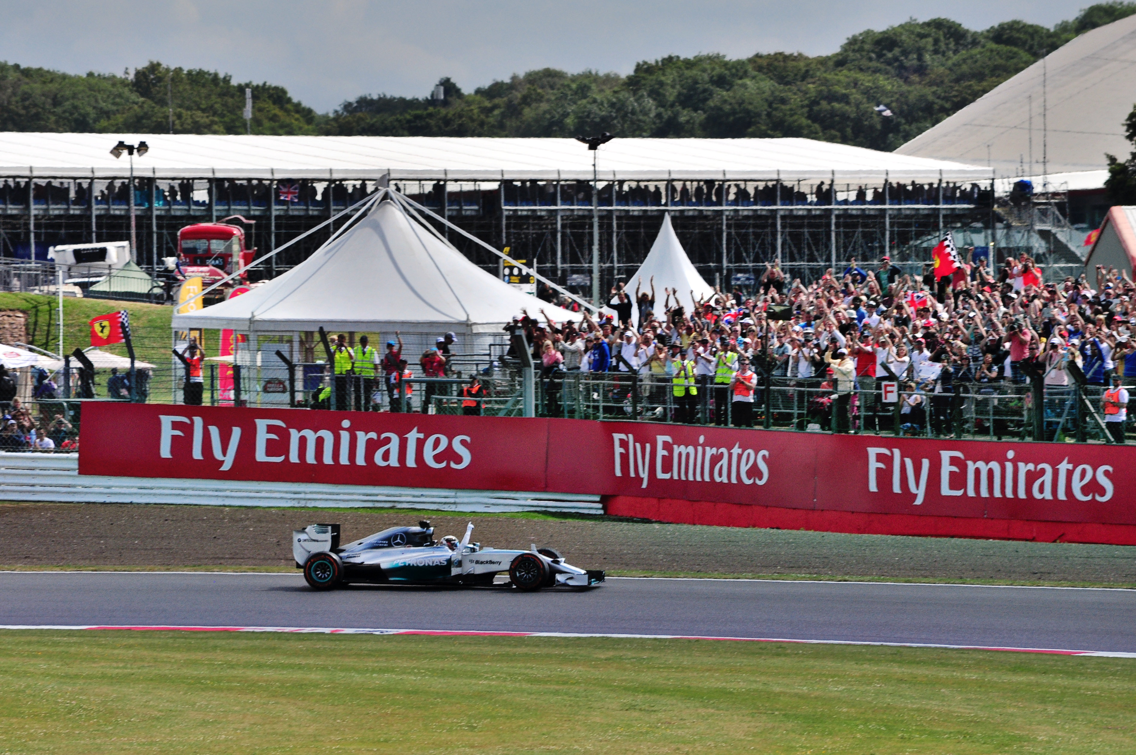 Lewis Wins!